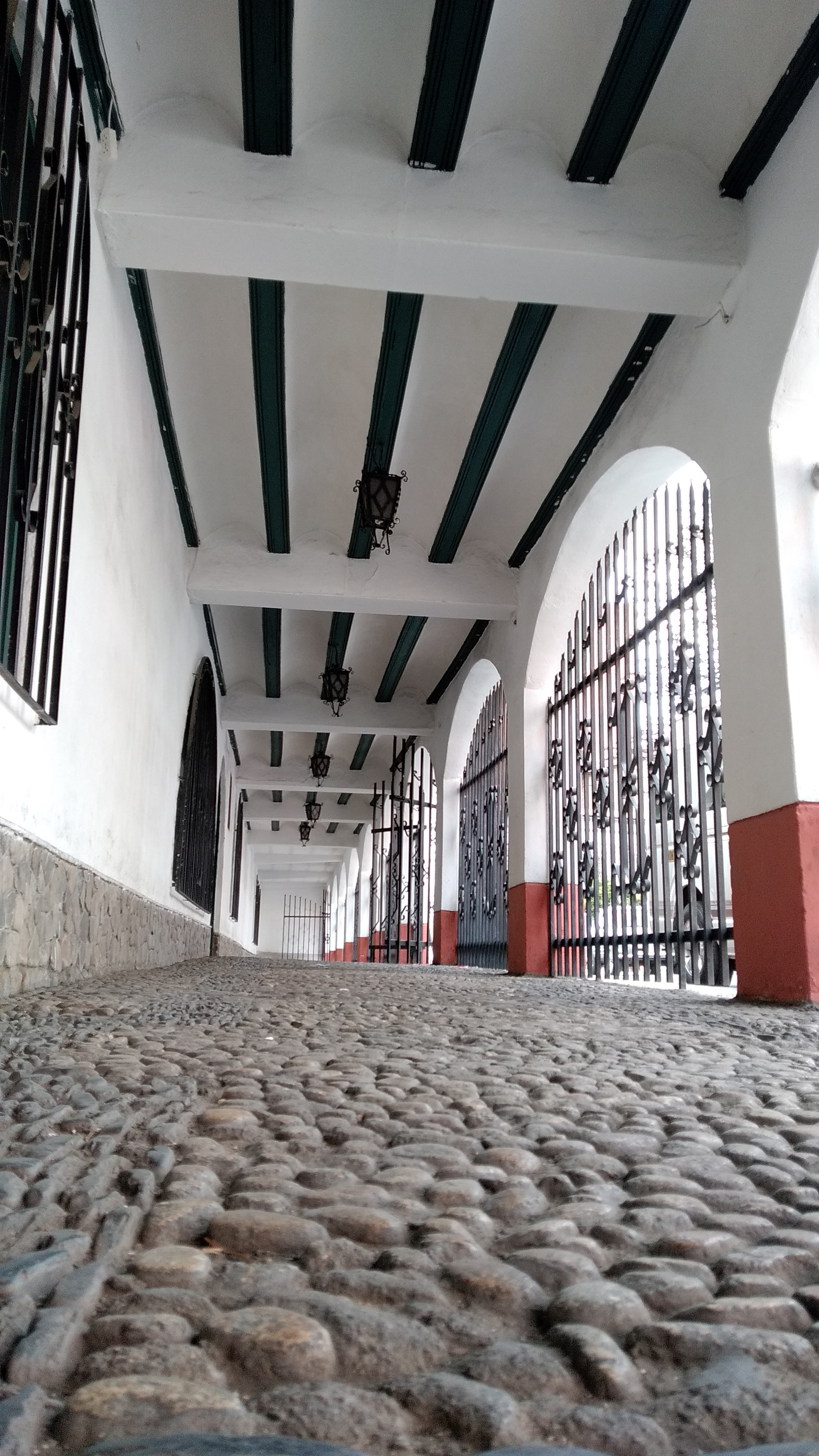 Detalle del pasillo exterior del Museo Costumbrista This medium shows the protected monument with the number L/00-032 in Bolivia.